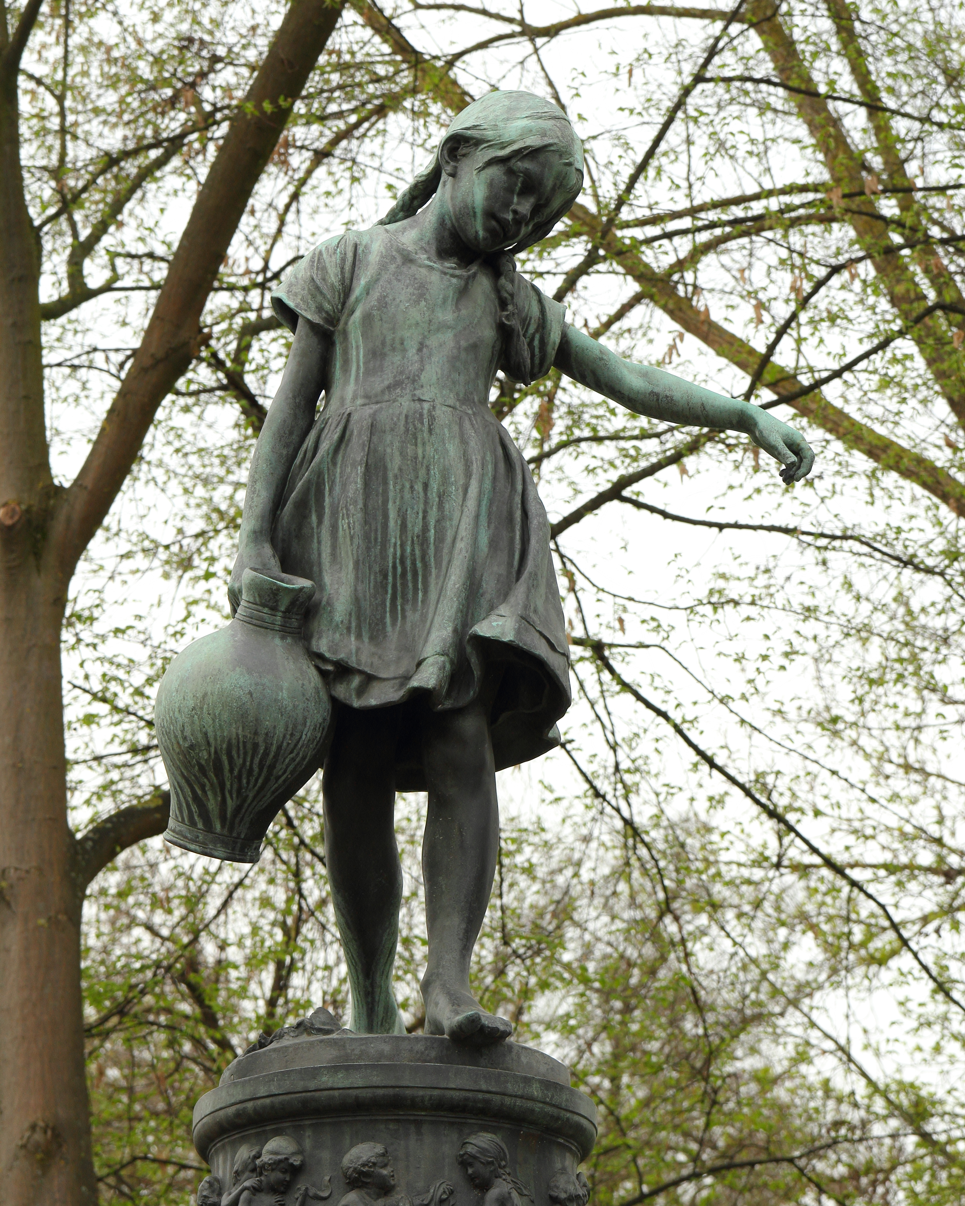 Roth (bei Nürnberg) - Bahnhofstraße - Detail (Städtlerbrunnen. Neurenaissance, von Hans Rößner, Guss Christian Lenz, bez. 1909.)